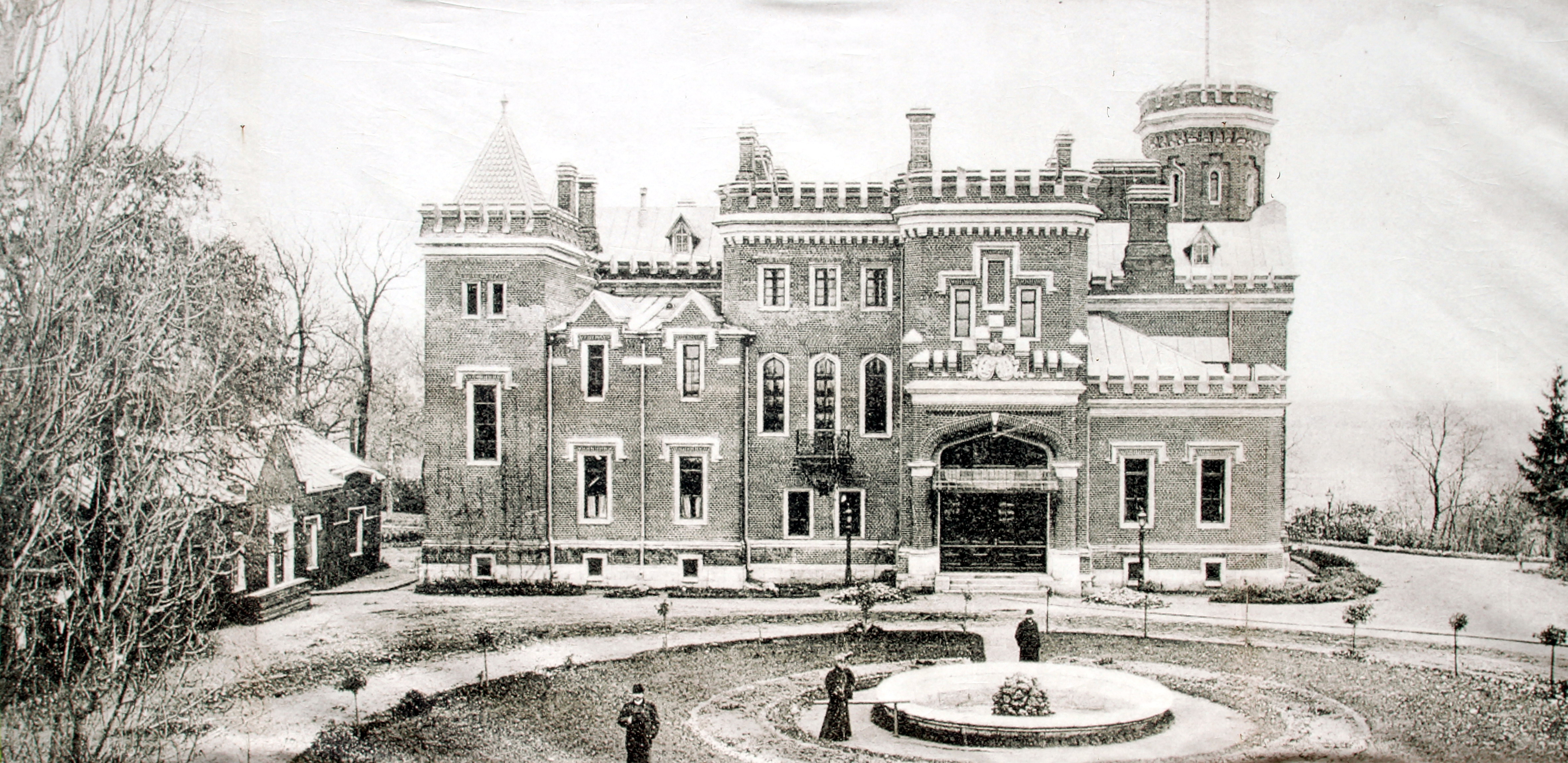 Рамонский дворец в 1890